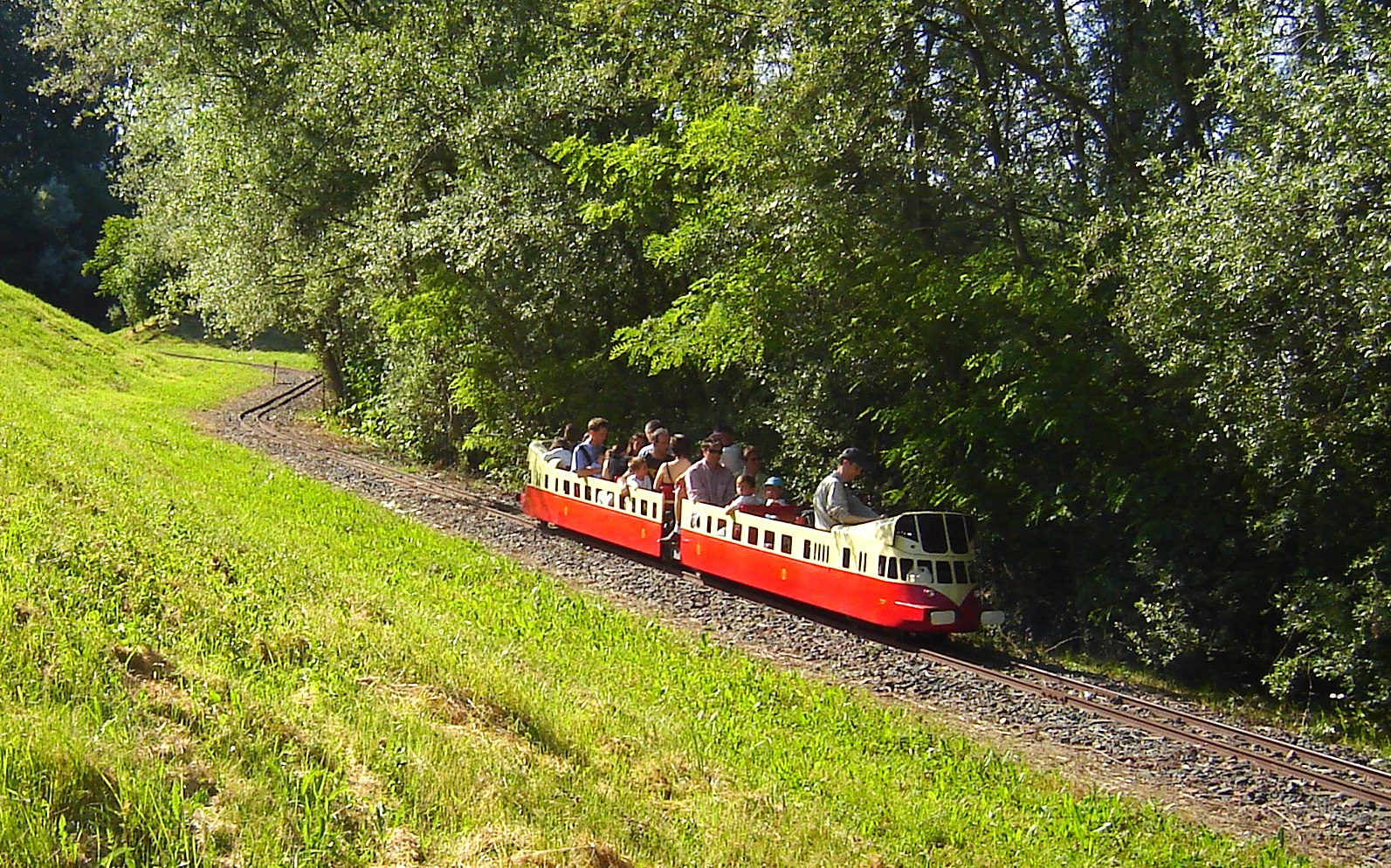 Le X131 au CFT Anse.